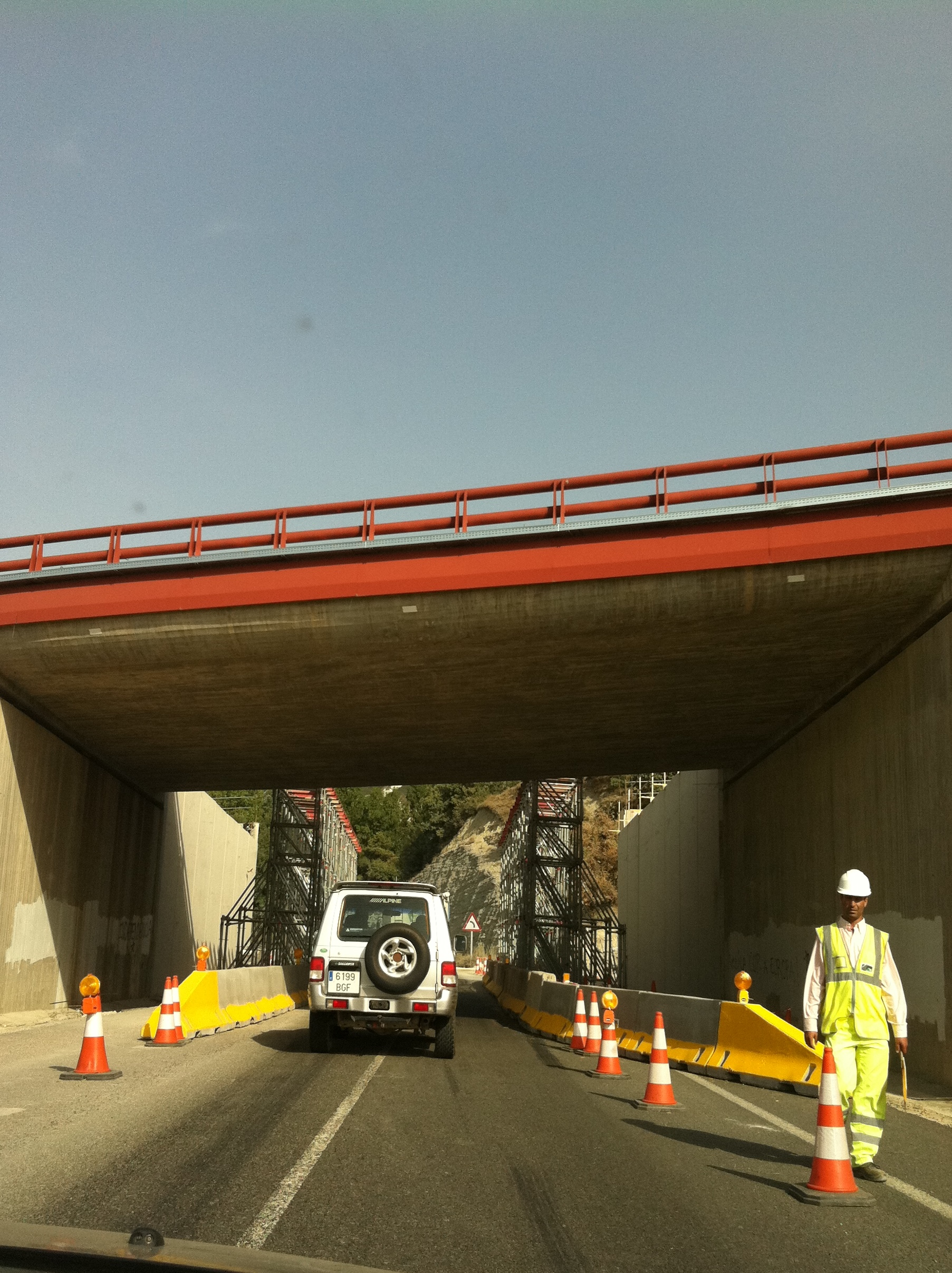 C-25 street works